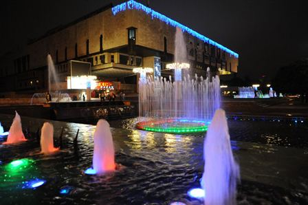 Фонтаны ХАТОба